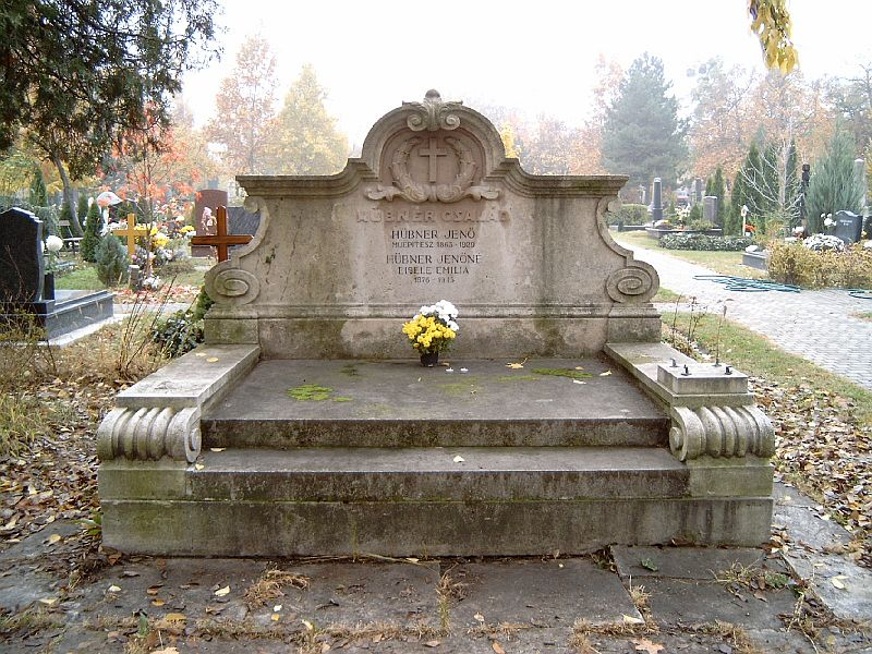 Hübner Jenő sírja Budapesten. Kerepesi temető: 43-1-17.